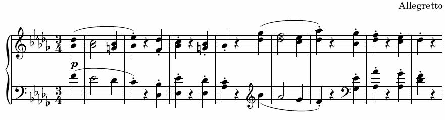 Description: neuf premières mesures du second mouvement de la sonate pour piano n° 14 de Beethoven (1801) Auteur: propre travail réalisé avec Lilypond